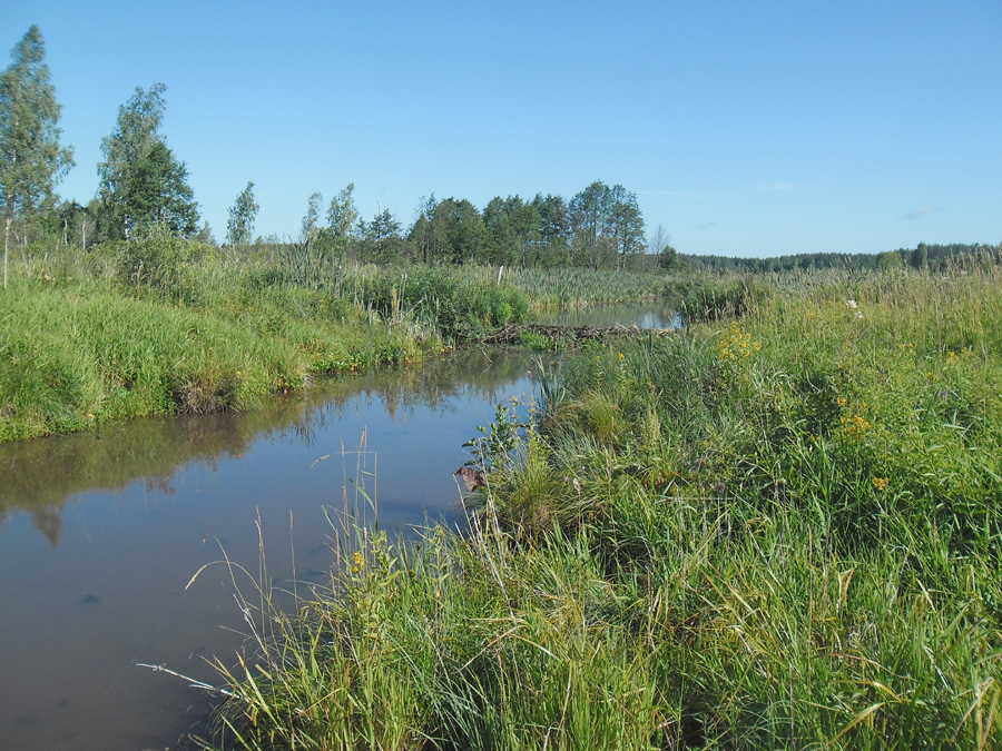 Каля гарадзішча на рацэ Сярчыстай бабры пабудавалі плаціну